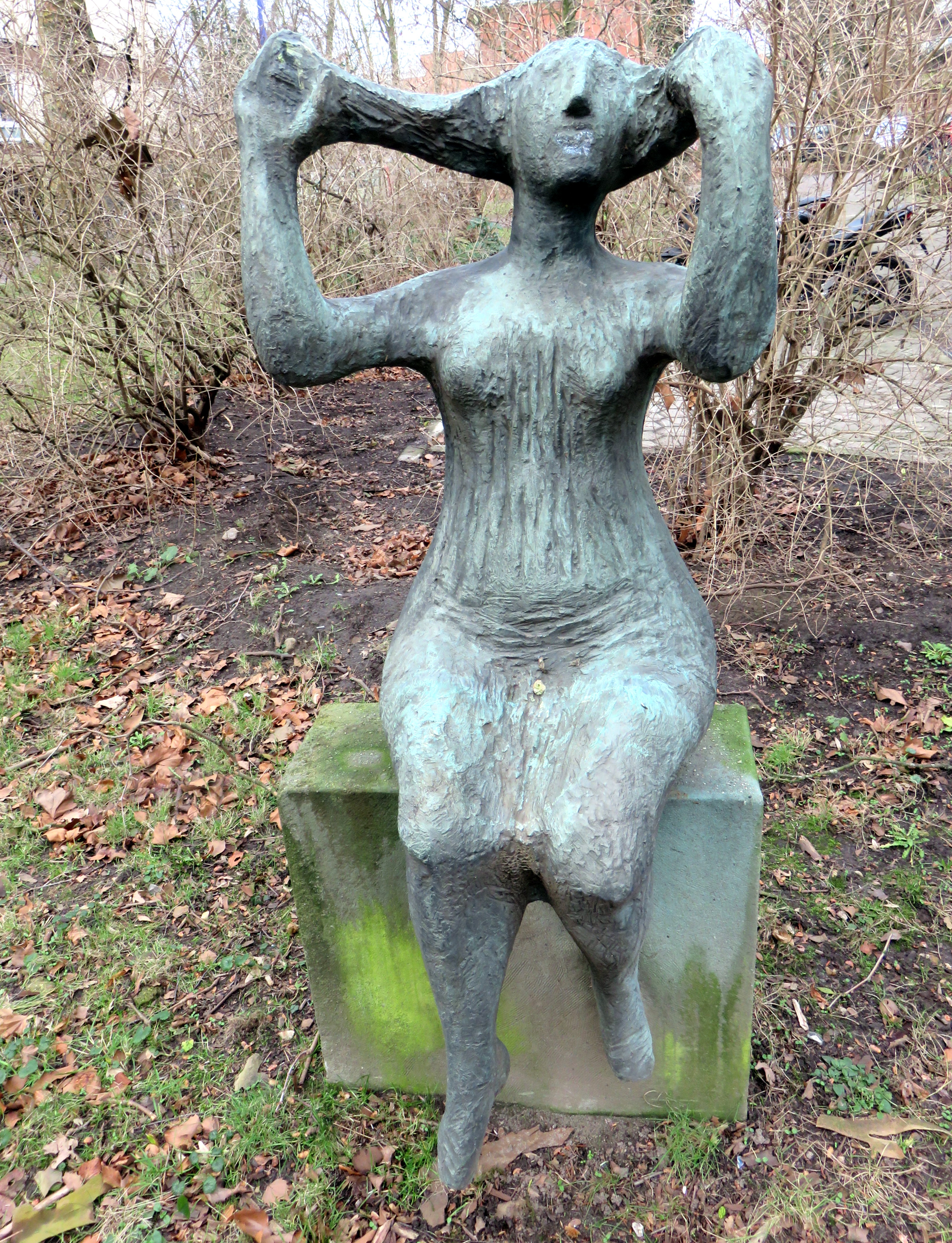 Bronze-Skulptur Frau mit Haarschopf, Grandweg 118–128 in Hamburg-Lokstedt. Die Skulptur wurde 1965/1966 von der deutschen Bildhauerin Gisela Engelin-Hommes geschaffen.